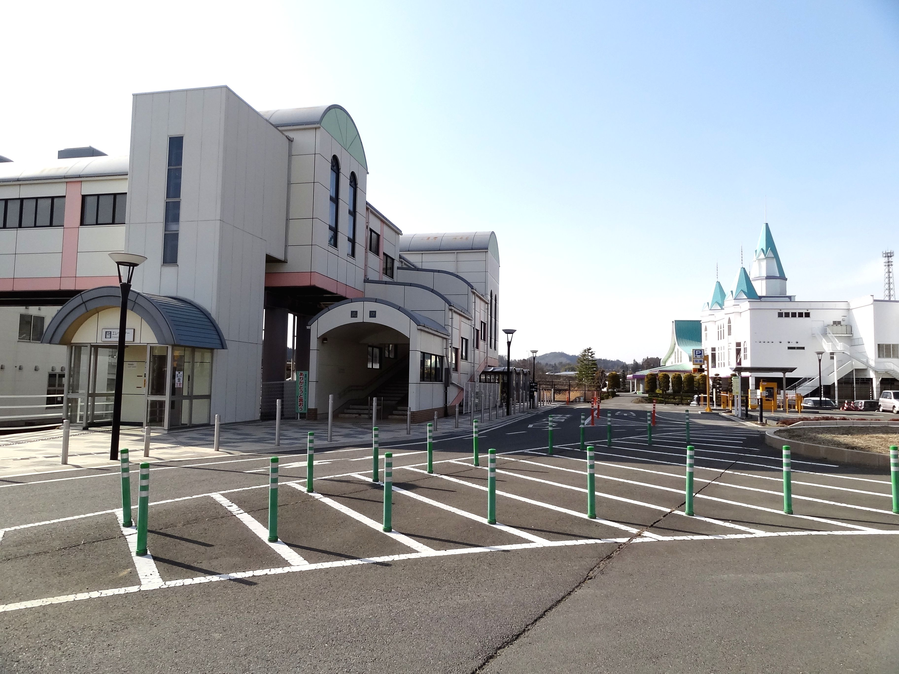 船引駅北口